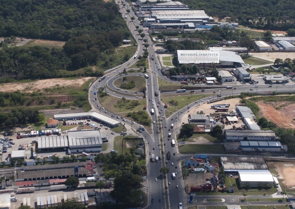 Trevo nas avenidas Torquato Tapajós e Max Teixeira, em Manaus, Amazonas, Brasil.